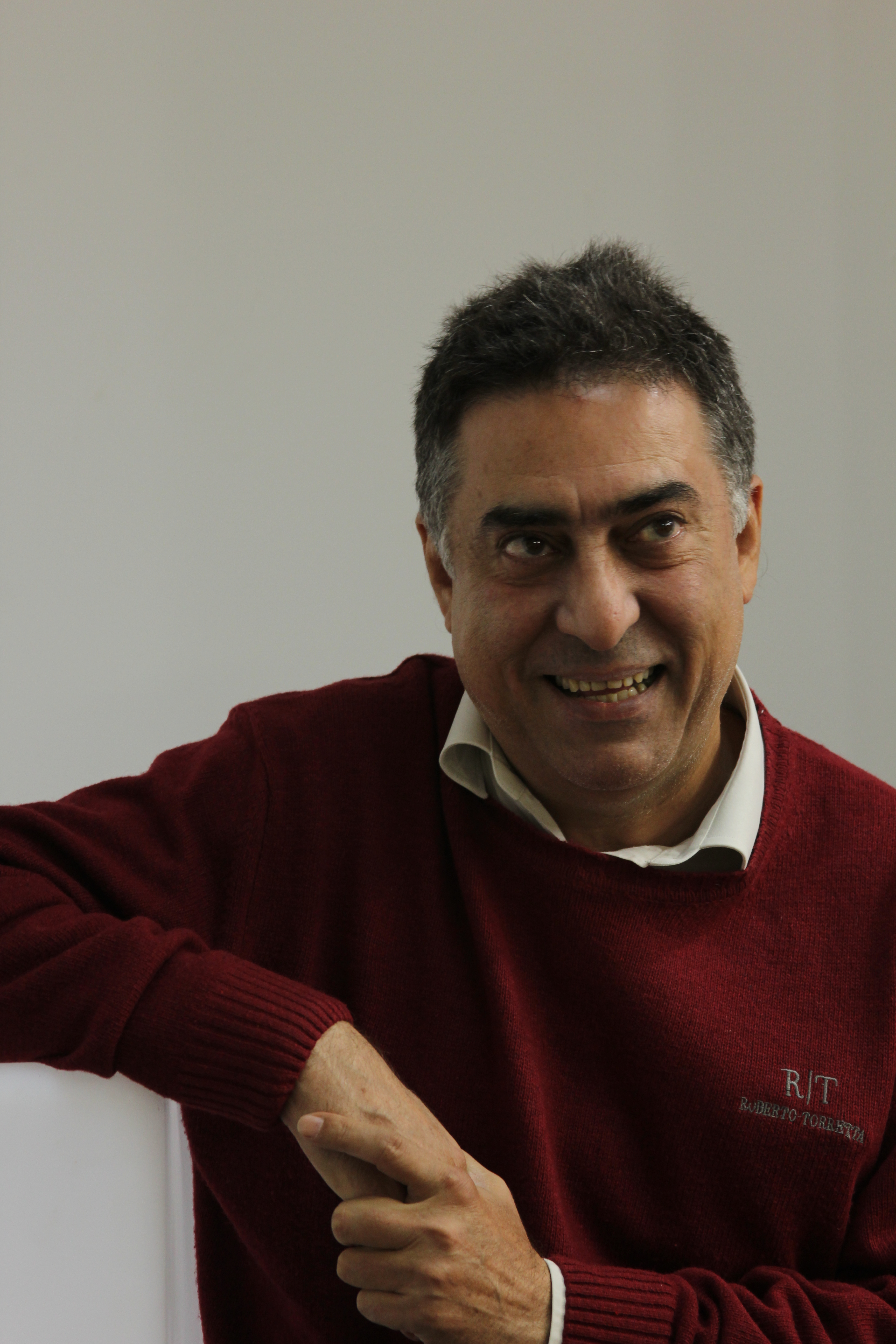 El periodista español Luis del Pino.